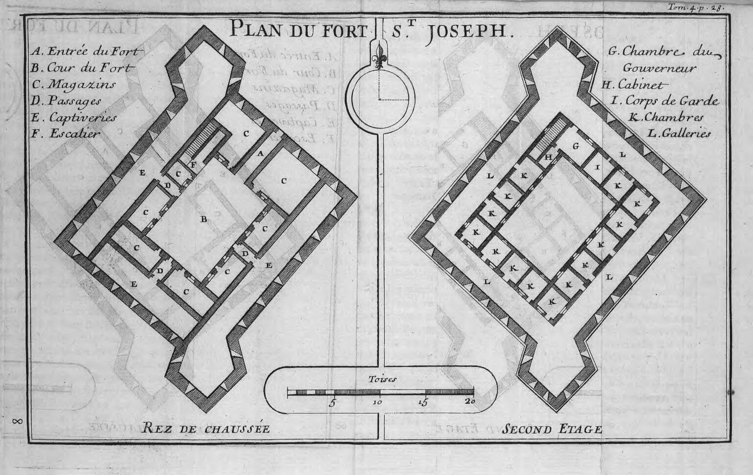 Plan du fort Saint-Joseph en Galam (Sénégal), illustration de Nouvelle relation de l'Afrique occidentale de Jean-Baptiste Labat